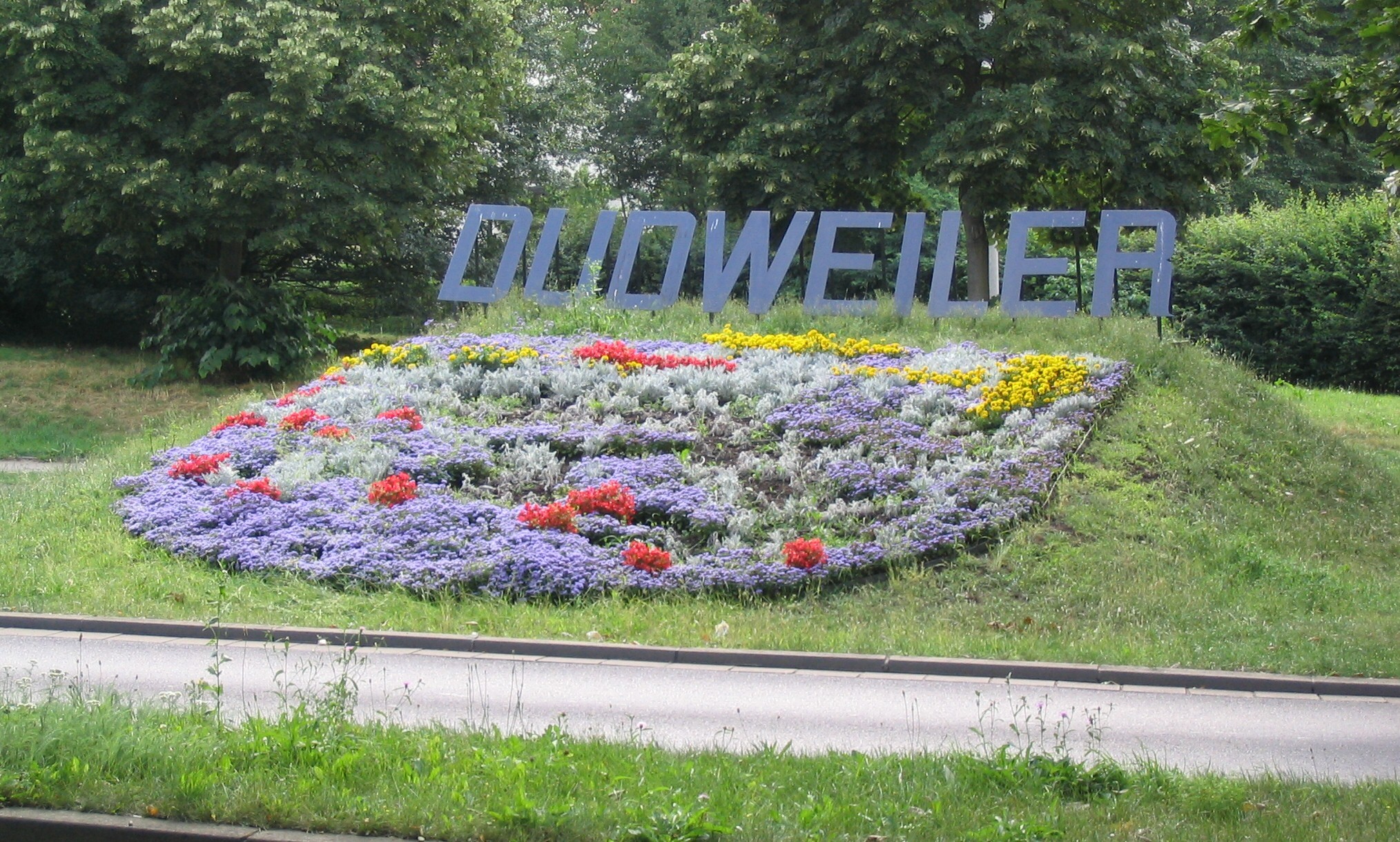 Beschreibung: Mit Blumen nachgebildetes historisches Wappen von Dudweiler (Saarbrücken/Deutschland). Photographer: kh80 Date: 2005-07-28 License: GFDL and cc-by-sa/2.0/de